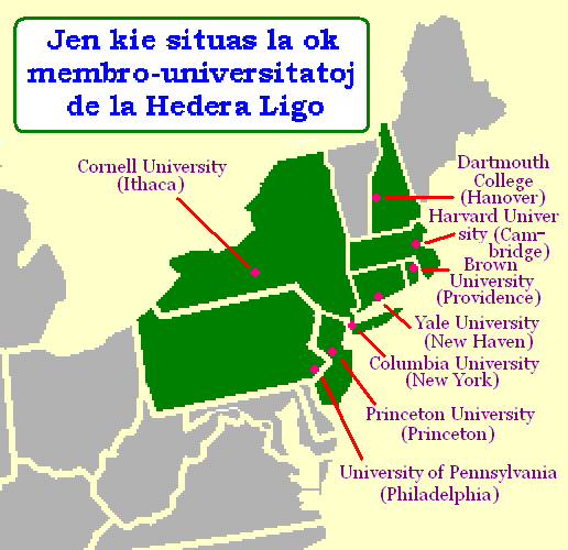 Mapo montranta la situojn de la membro-universitatoj de Ivy League